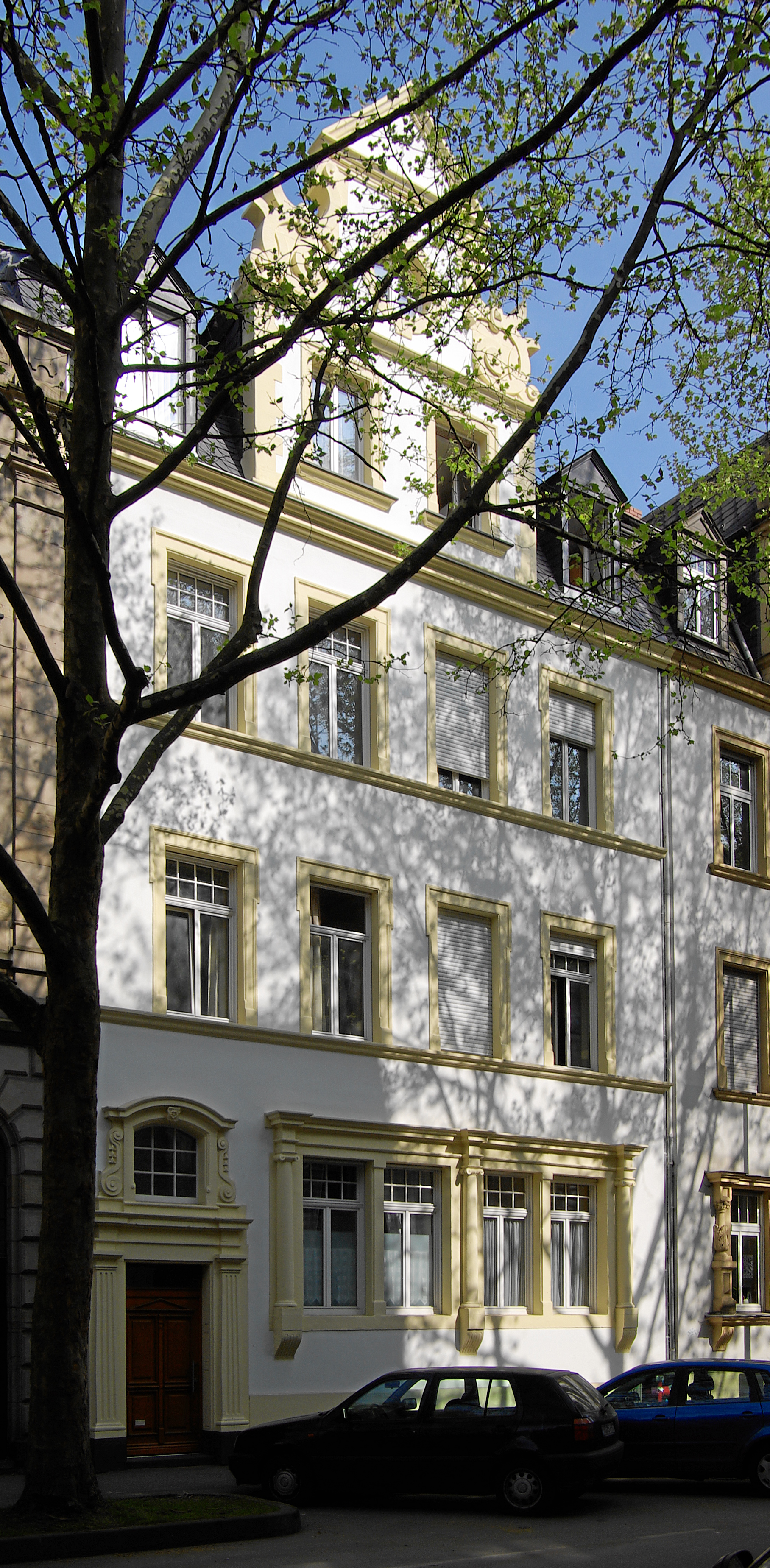 Trier, Bruchhausenstr. 17, dreigeschossiges Zeilendoppelwohnhaus, Neurenaissance, 1904, Architekt Peter Marx; Ausstattung